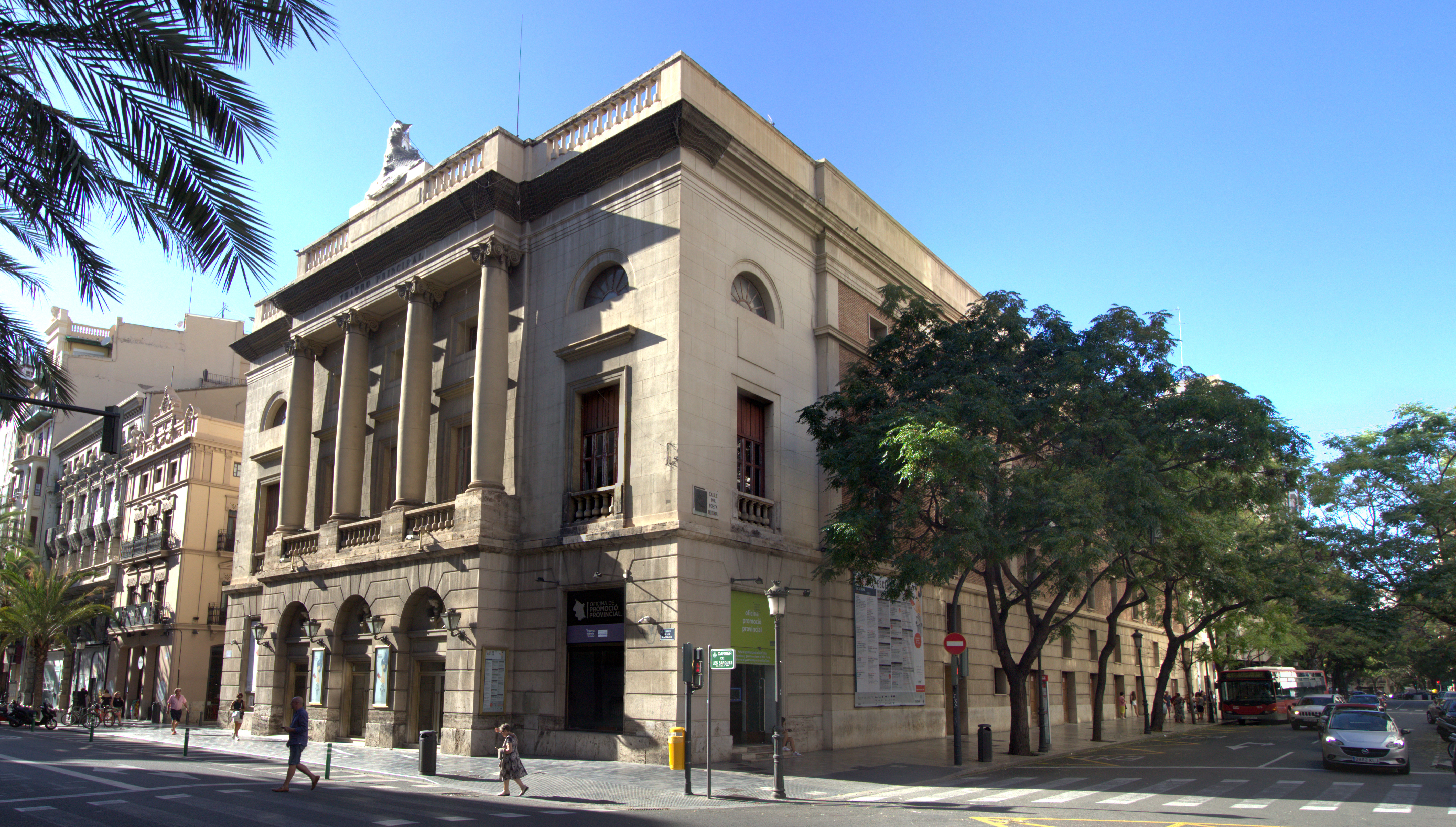 Teatro Principal en la calle de las Barcas número 15 de Valencia